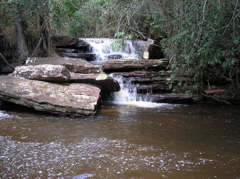 Cachoeira do Pilão, Cachoeirinha, Wagner-Ba, localizada a 18 km da Sede Municipal.